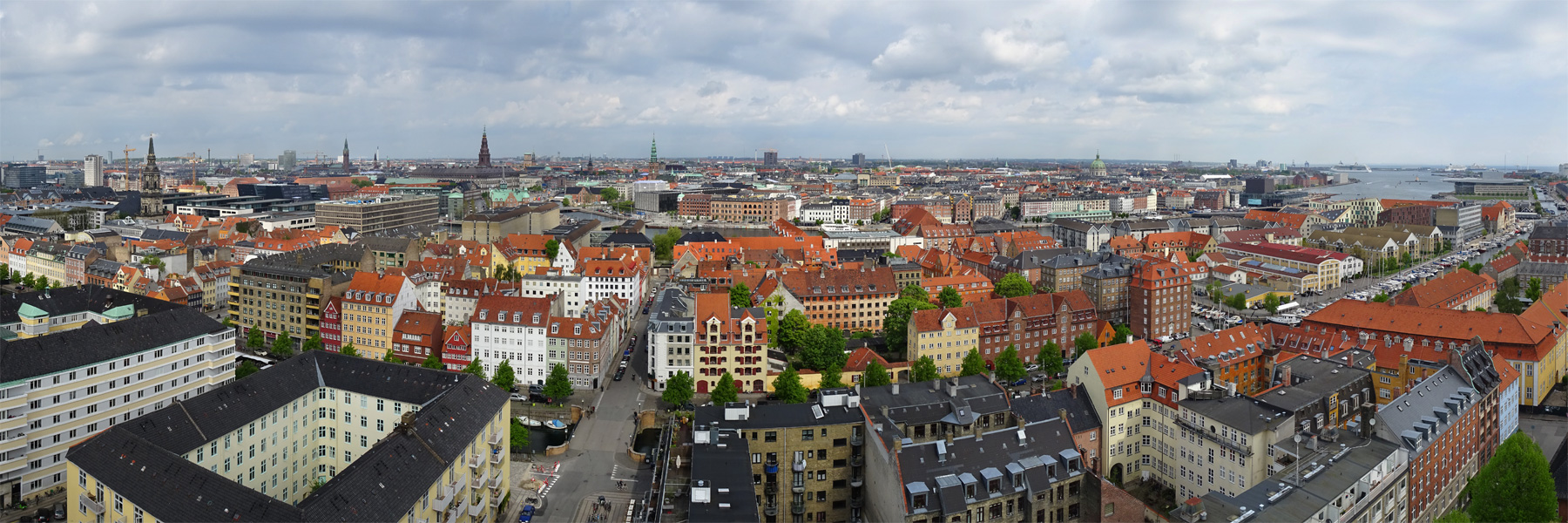 København, Danmark.